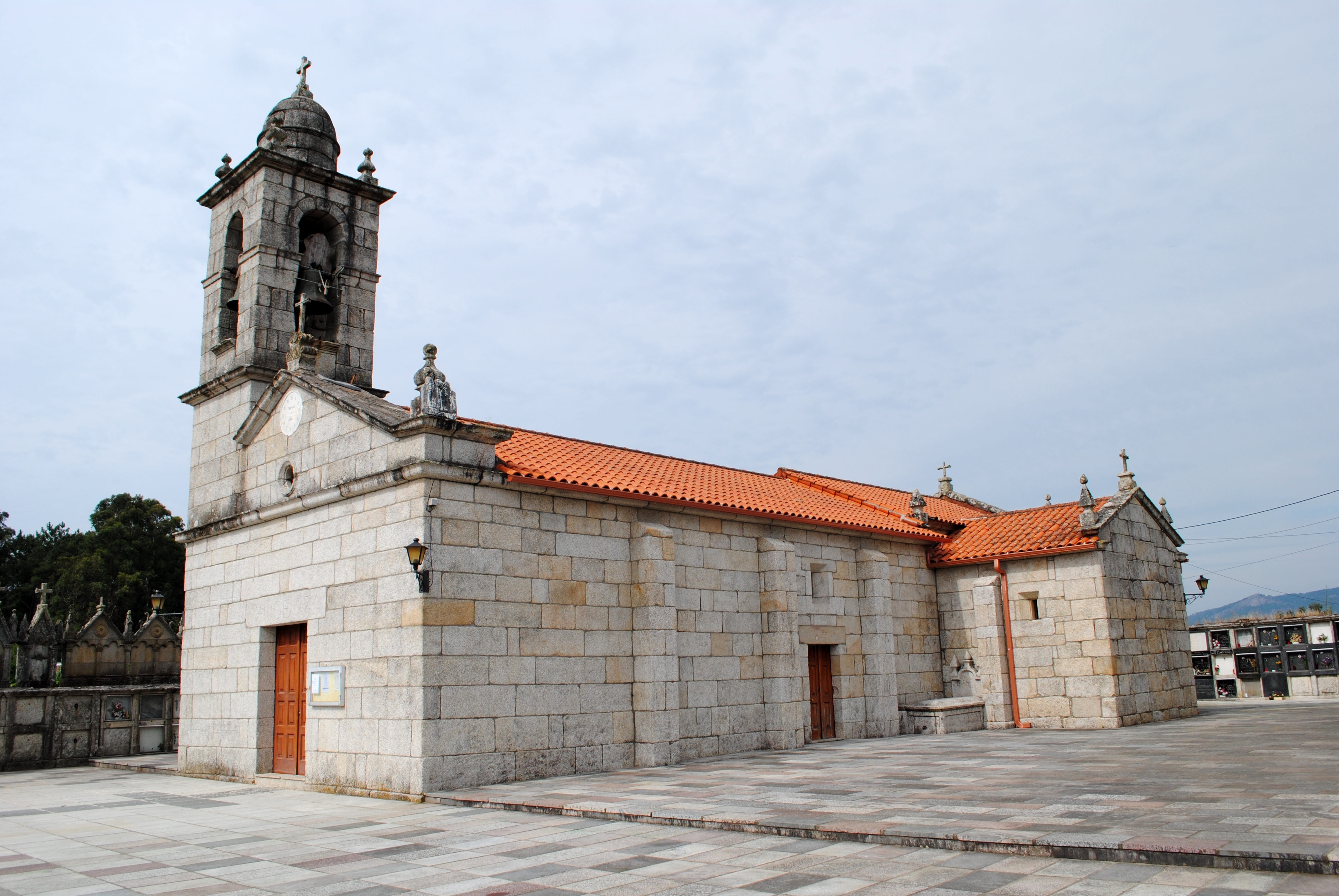 O Porriño, Santiago de Pontellas, iglesia.